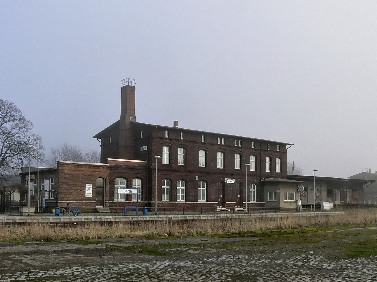 Bahnhofsgebäude von Barth/ Barth, Germany Railroad Station